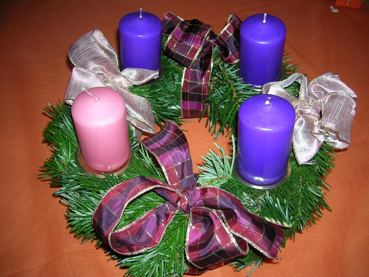 Adventkranz (liturgisch)